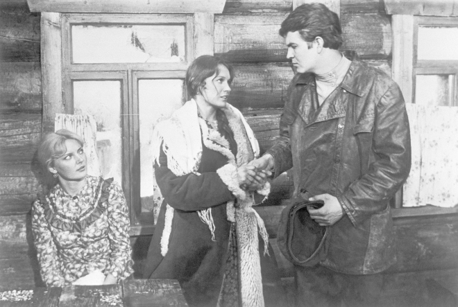 Escena de "El fin de los Liubavina"